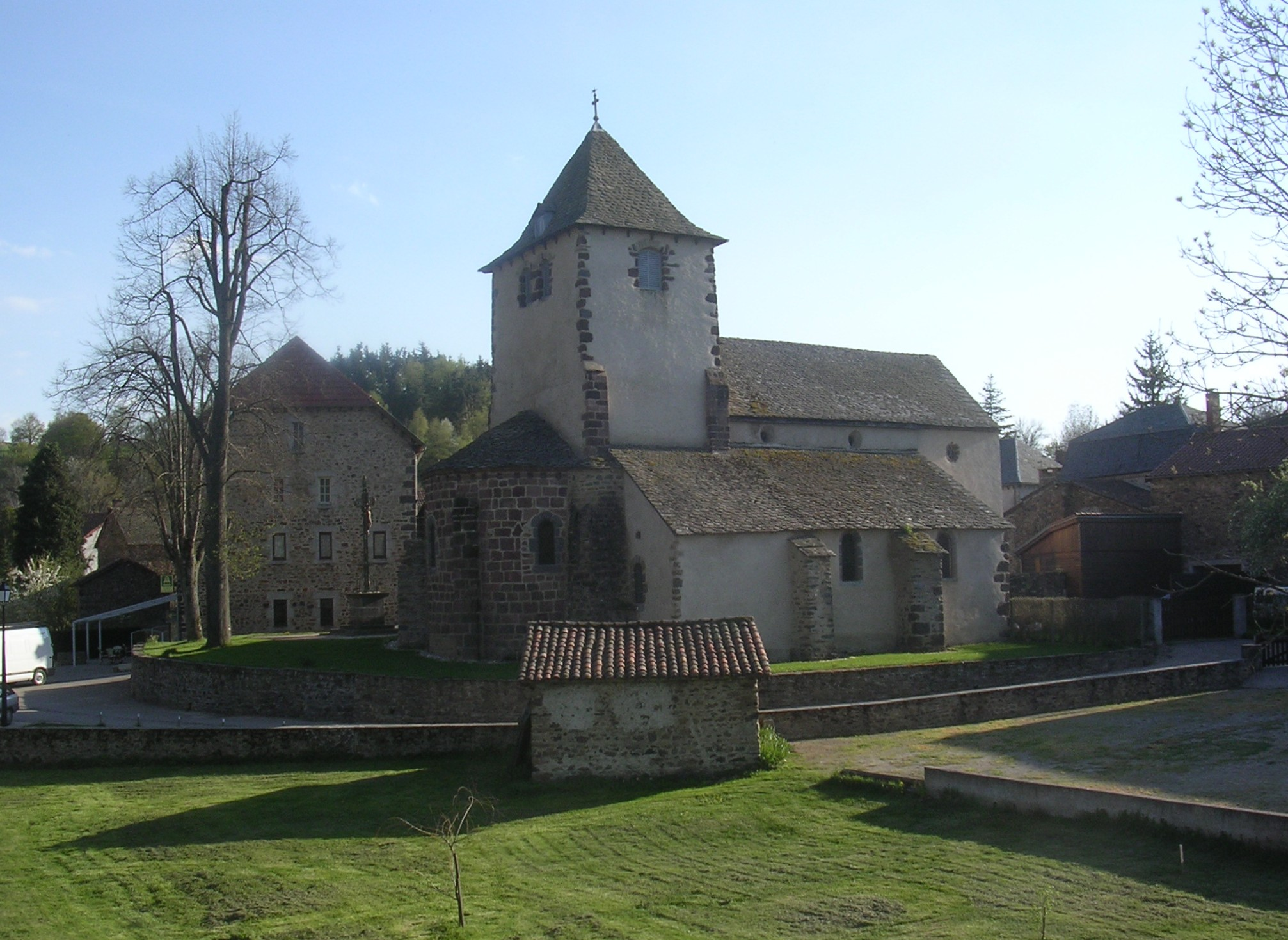 Eglise de Saint-Poncy